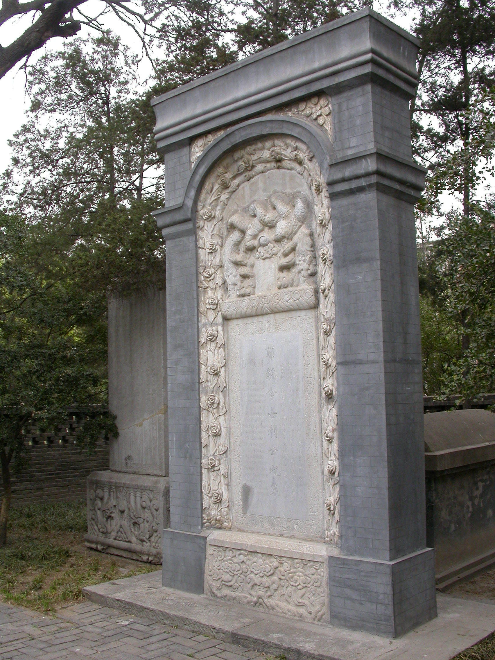 Matteo Ricci's gravestone in Beijing